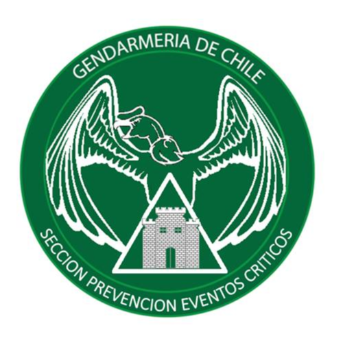 Logo Sección Prevención Eventos Críticos (SPEC)